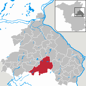 Müncheberg in Brandenburg (Country) - District Märkisch-Oderland